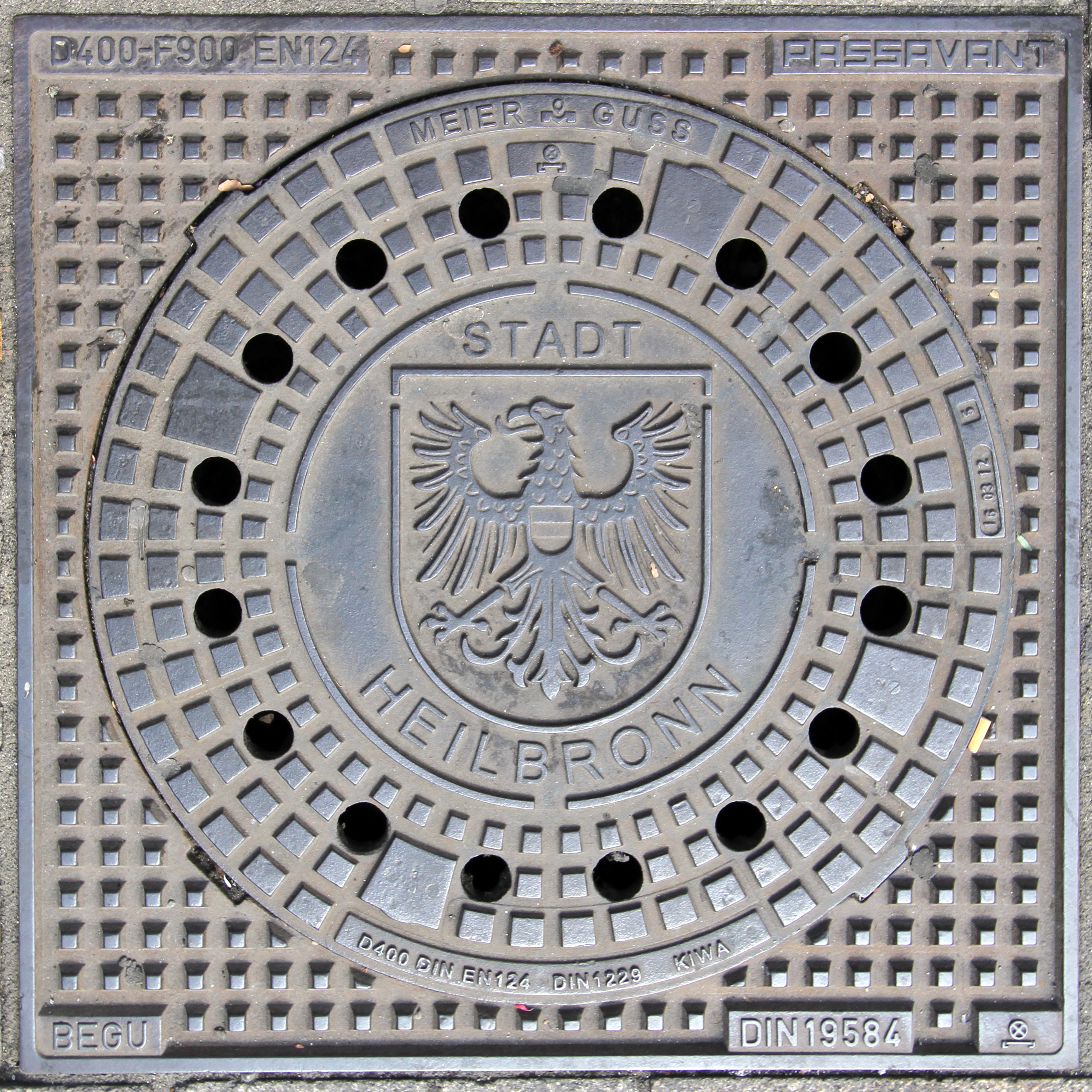 Heilbronn